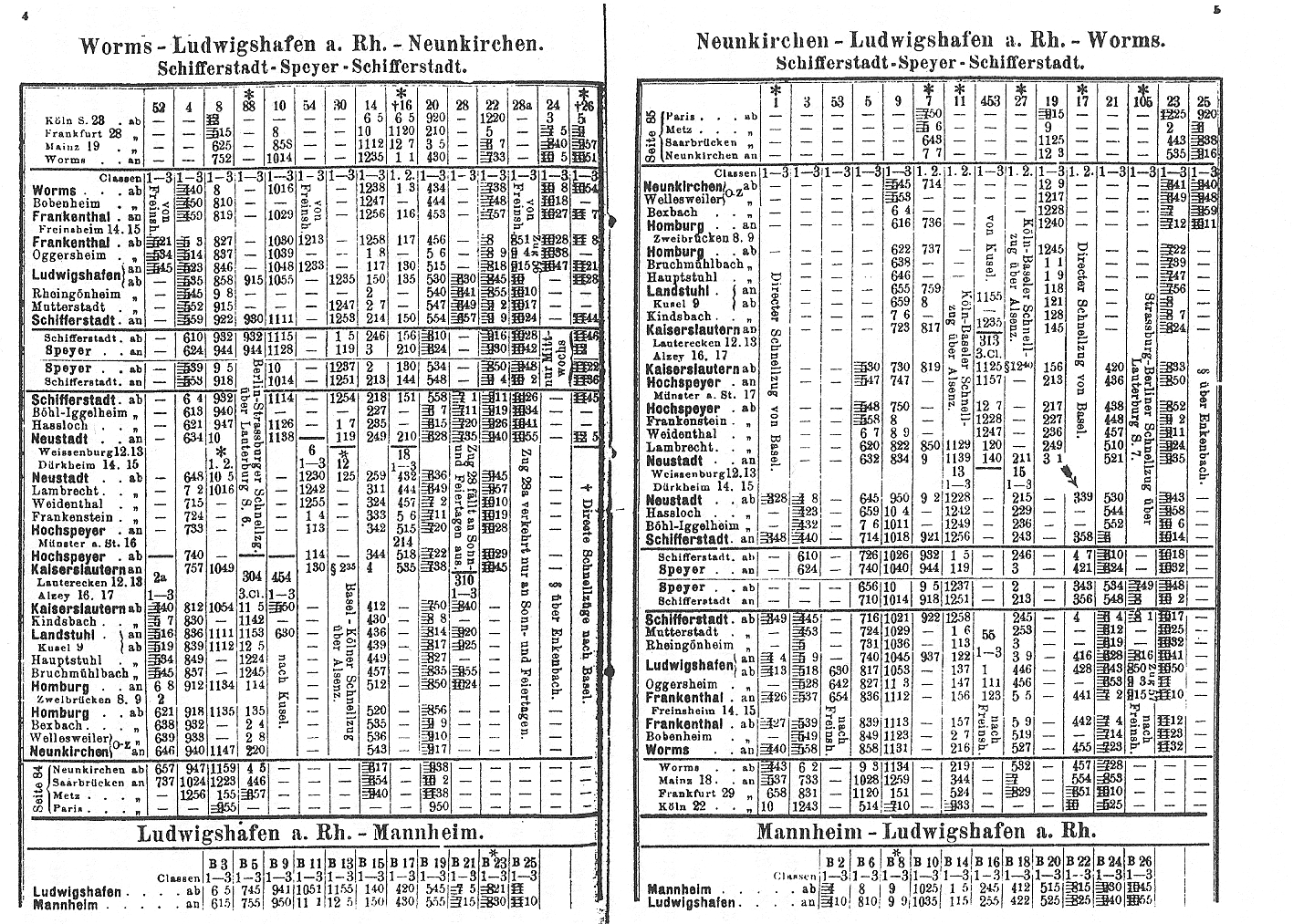 "Kurs-Buch enthaltend die Fahrpläne der Pfälzischen Eisenbahnen" für den "Winterdienst. Gültig vom 15. Oktober 1884 an"